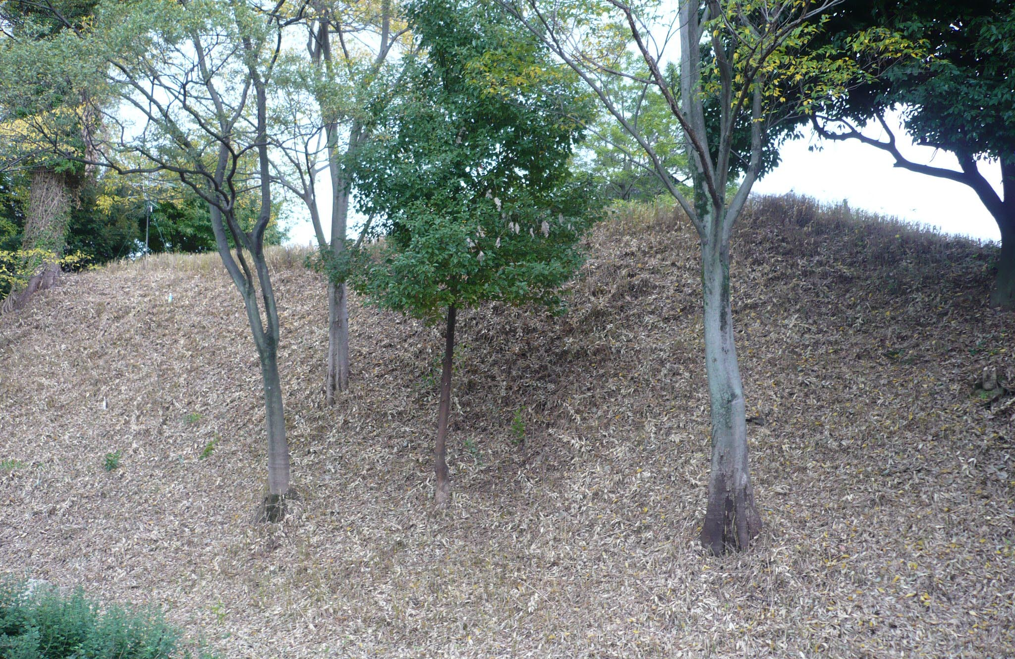 北辺の堀跡